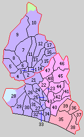 静岡県小笠郡の町村。